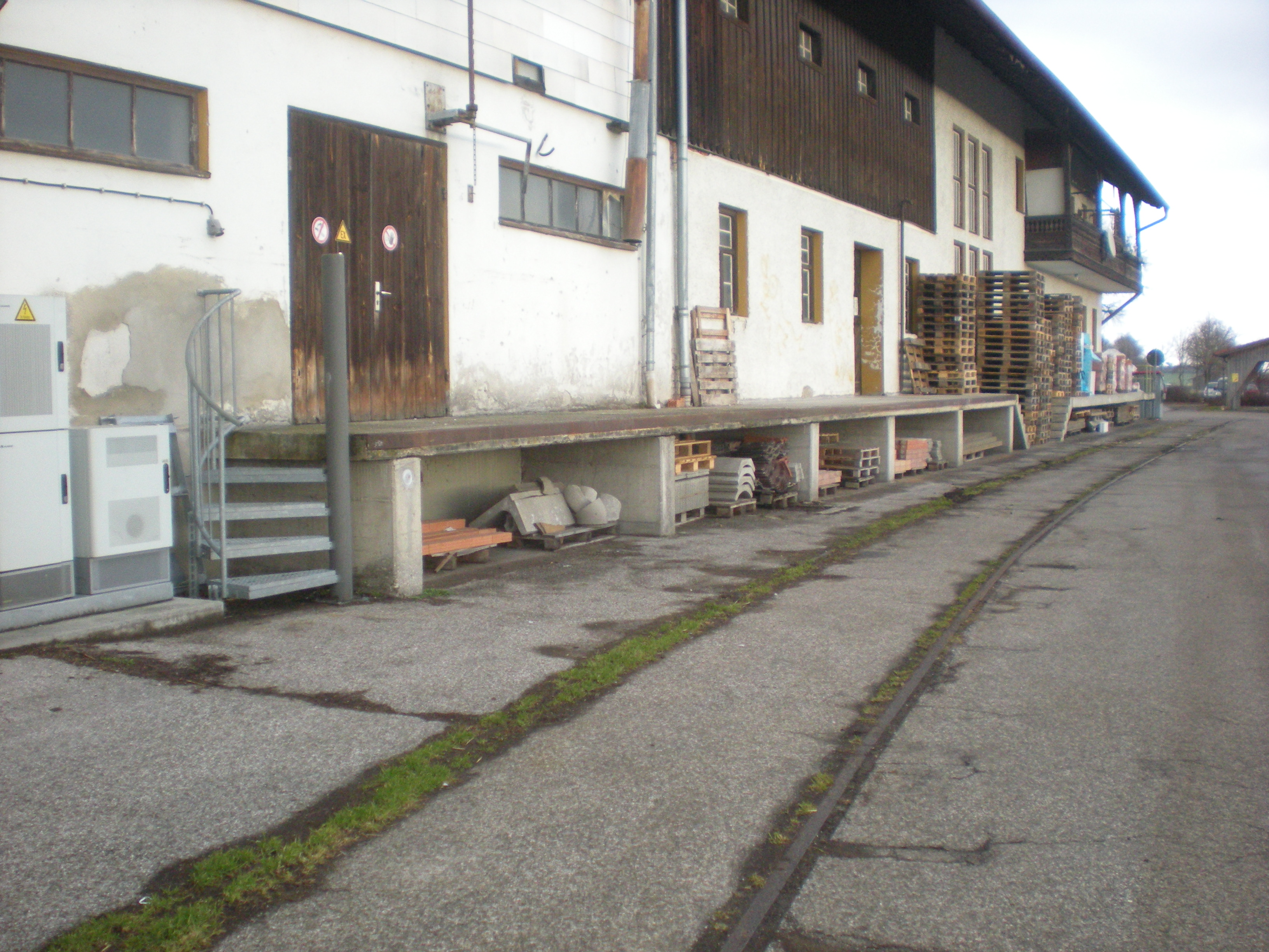 Ehemaliges Stichgleis zur Laderampe des Raiffeisen-Lagerhauses am Haltepunkt Steinhöring, vor dem Umbau zum Kreuzungsbahnhof